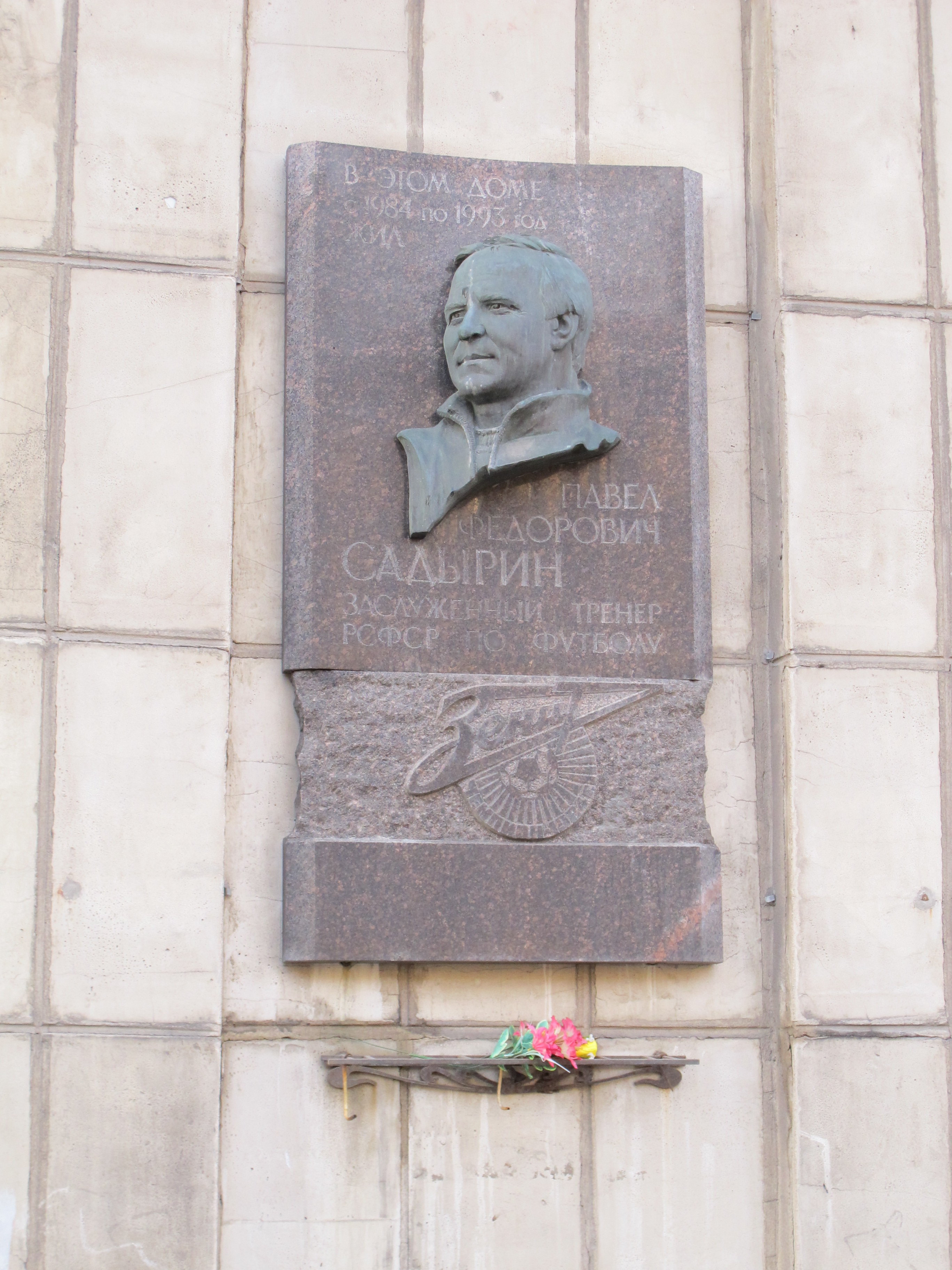 Moskovsky73Sadyrin